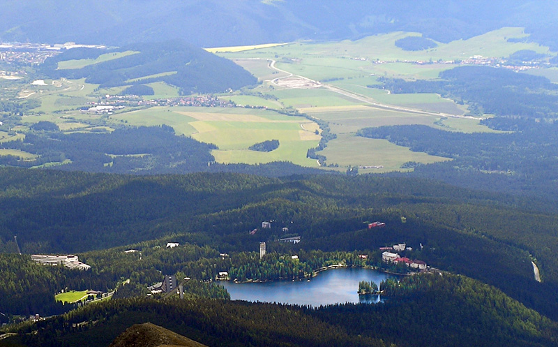 Strbske_Pleso_from_Krivan